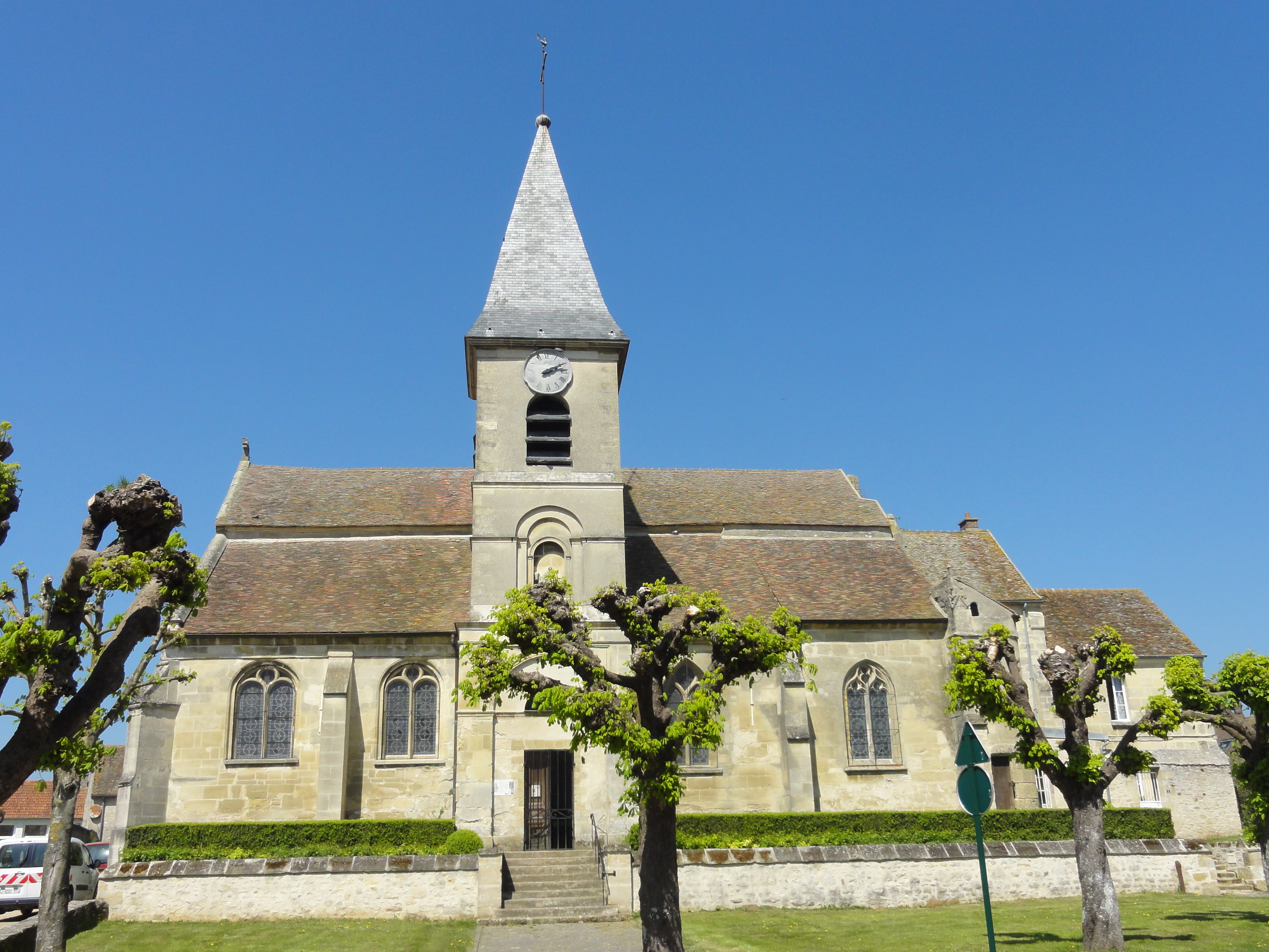 Église Saint-Martin de Commeny (voir titre).